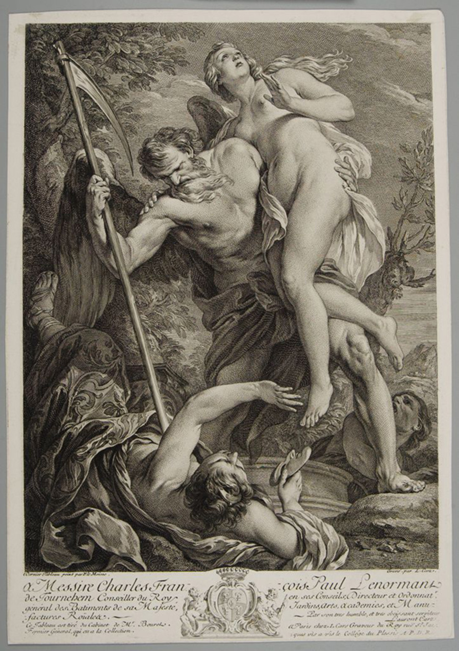 gravure